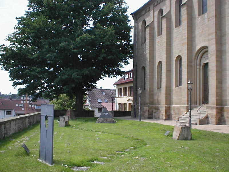 Vater-Unser-Skulpturengarten bei der evang. Kirche in Hoffenheim